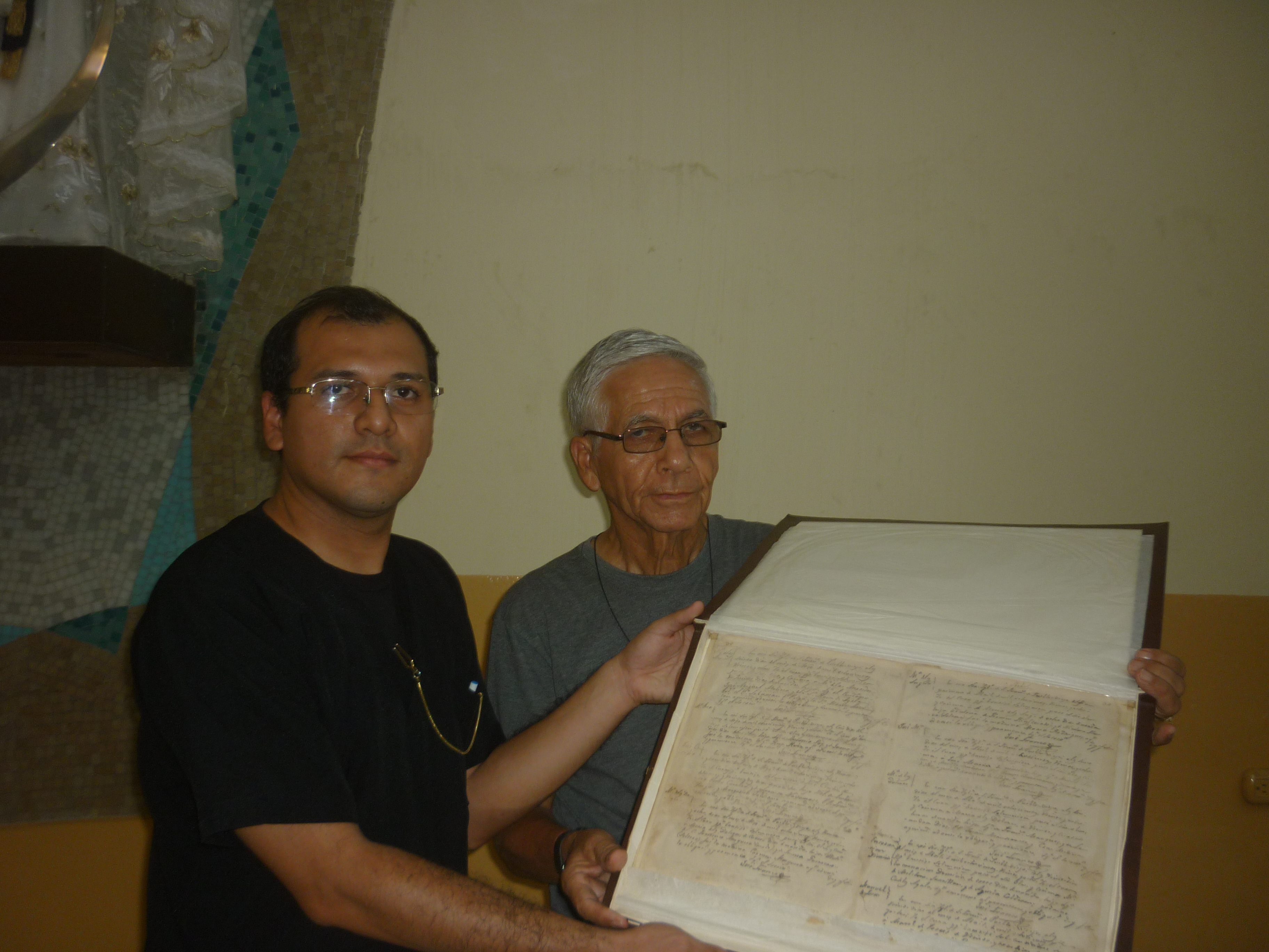 Foto de la Fe de Bautismo Original en la Iglesia San Francisco de Puebloviejo. En la gráfica el padre Juan Monar y el fiel Víctor Gamboa